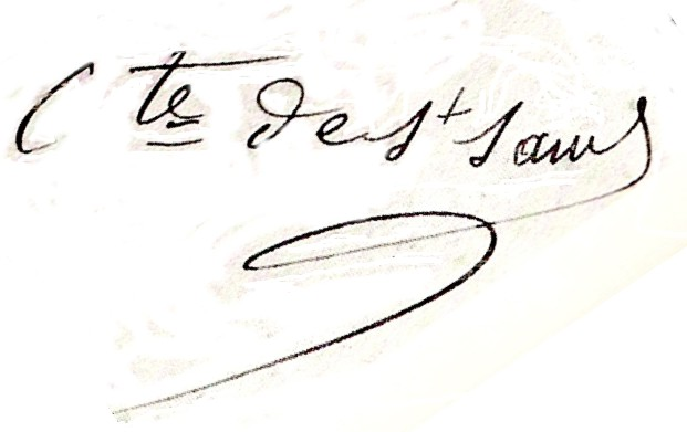 SignatureComtedeSaint-Saud.jpg